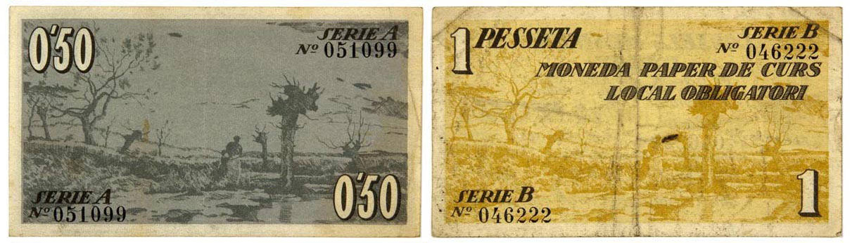 Reverso de los billetes de 0,50 cm y 1 pta. de curso local obligatorio por el Consell Municipal de Olot, 23 de junio de 1937. Donde se encuentra una reproducción realizada por Xavier Nogués de un paisaje de Joaquín Vayreda i Vila.